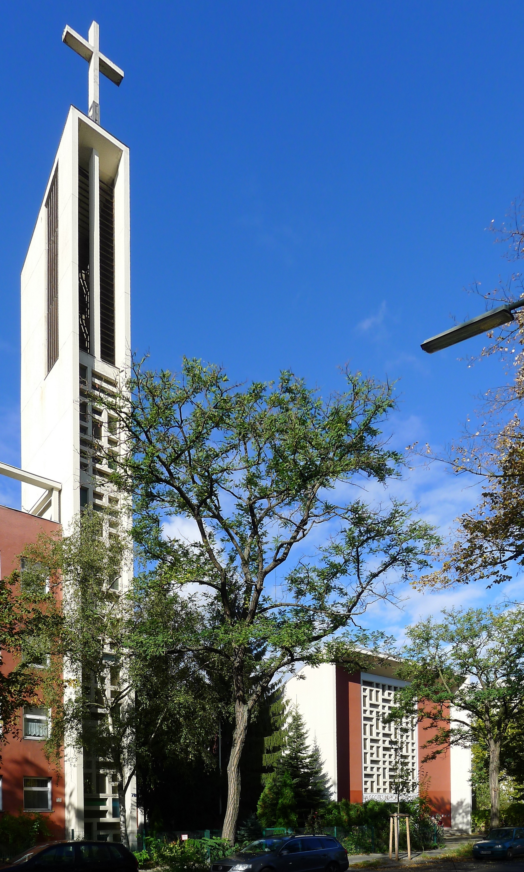 Blick auf Campanile und Portalvorbau